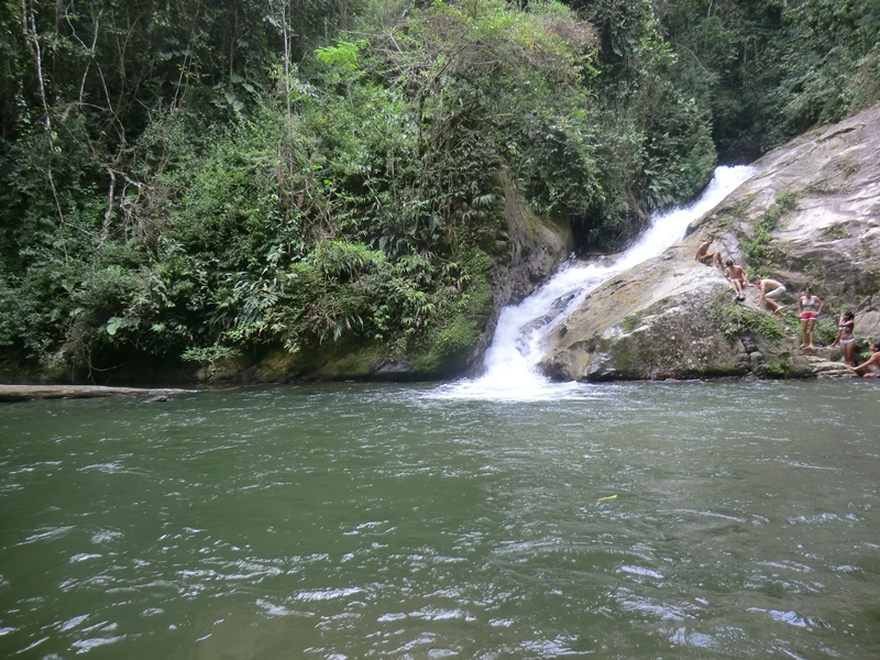 Pozo natural en el río del Norte. Venezuela